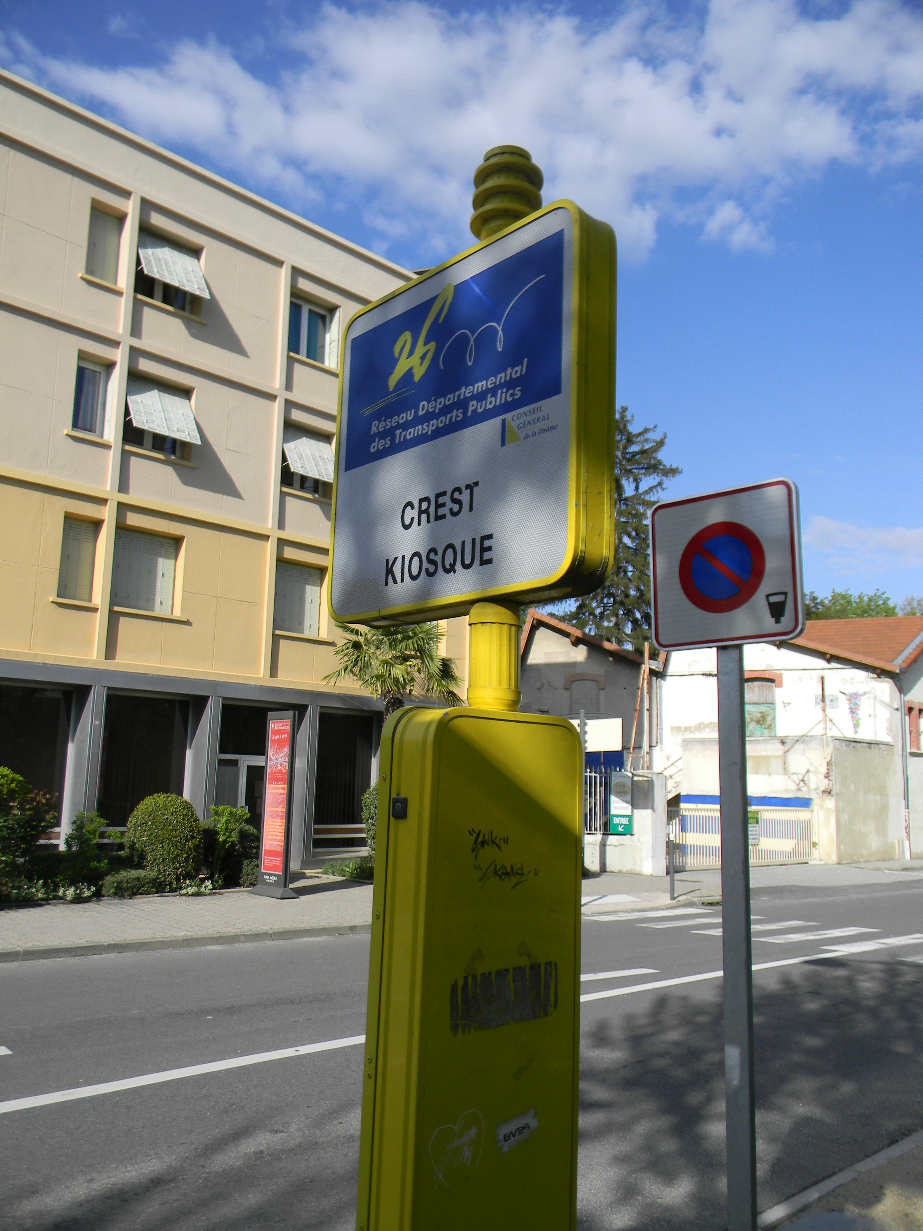 Arrêt de bus "Crest Kiosque" du réseau départemental des transports publics à Crest.